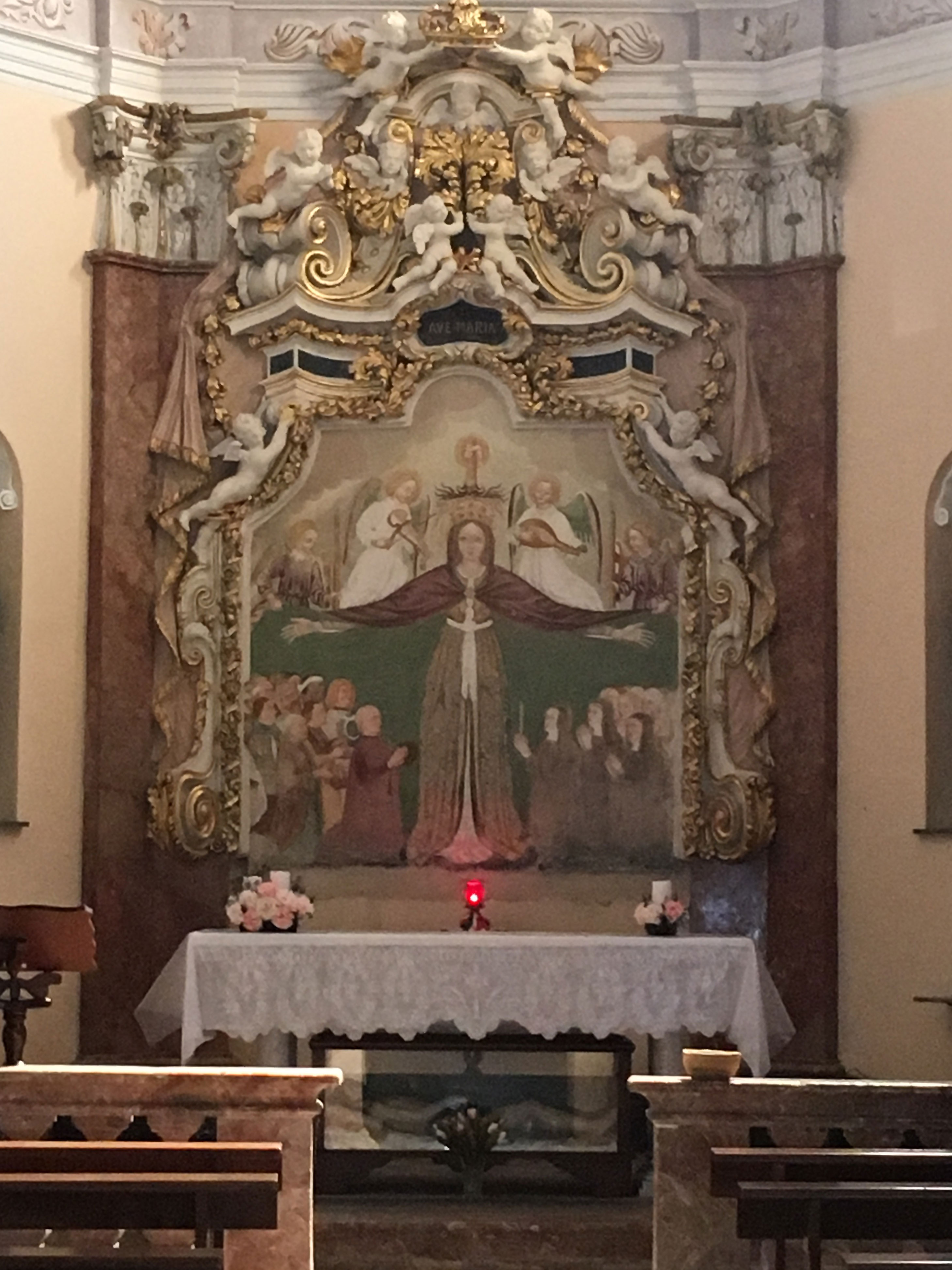 Altar der Marienwallfahrtskirche Santuario di Trezzo in Dumenza, Italien